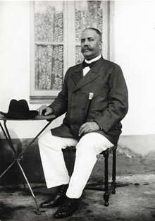 Gustave Pierre Théodore Gallet (1850-1926).